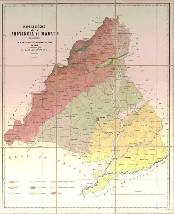 Madrid (Comunidad Autónoma). Geología. 1864 . Mapa geológico de la provincia de Madrid / formado por Casiano de Prado. - Escala [ca. 1:200.000]. - Madrid : Junta Estadística General del Reino, 1864 (Madrid : lit. de G. Pfeiffer) Realizado por Casiano del Prado y Vallo (1797-1866), ingeniero de minas y geólogo ; el mapa se completa con la memoria "Descripción física y geológica de la provincia de Madrid, editado en 1864 por la Imprenta Nacional. Representa uno de los primeros ejemplares de mapas temáticos de contenido geológico de nuestro país ; como base se empleó el mapa de la provincia de Madrid de Francisco de Coello.